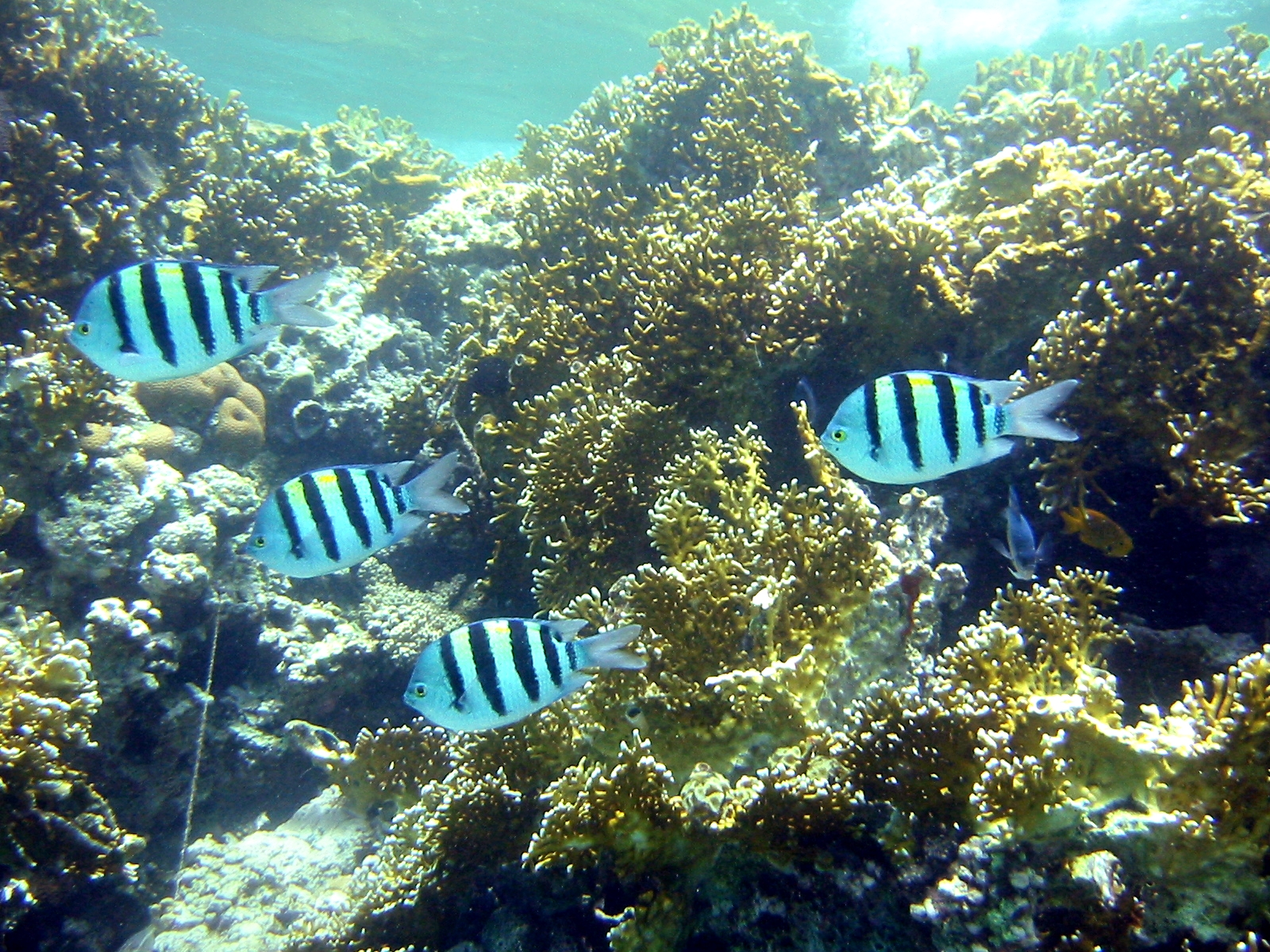 taken in Taba red sea